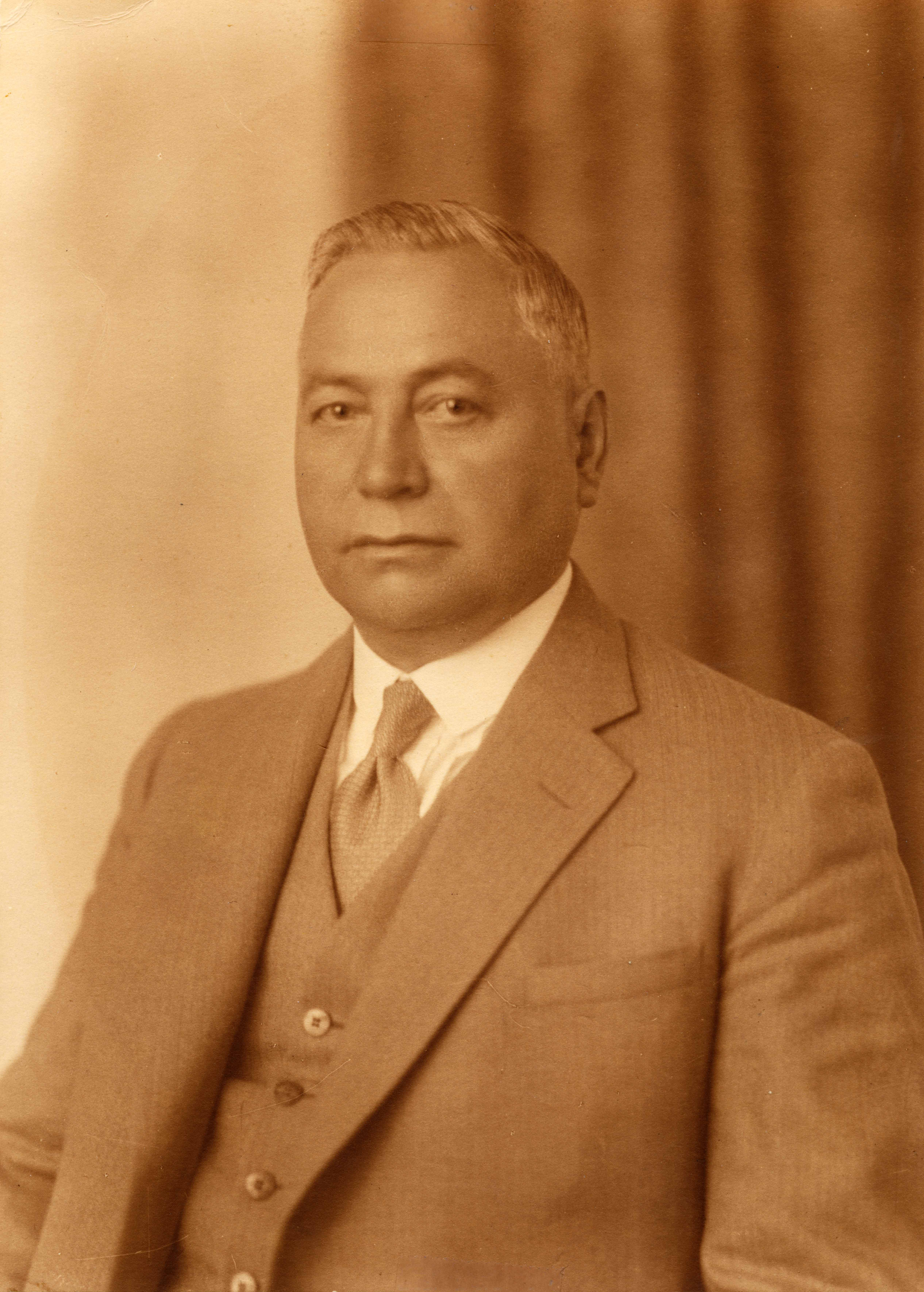 Anton Franken (Portraitphoto vermutlich von Hugo Schmölz)